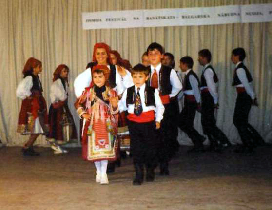 Банатски българчета на Фестивала за българска песен и танц в Тимишоара; © 2006 Георги Петров